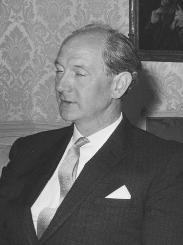 Jost Evers.